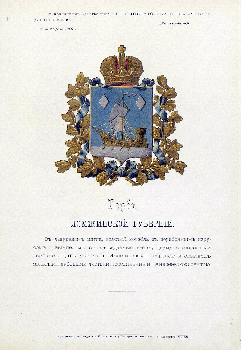 Official Russian Empire coat of arms Lomzha Governorate. Герб Российской Империи Ломжинской губернии с официальным описанием в Гербовнике Бенке. Утверждён Императором Всероссийским Александром Вторым.